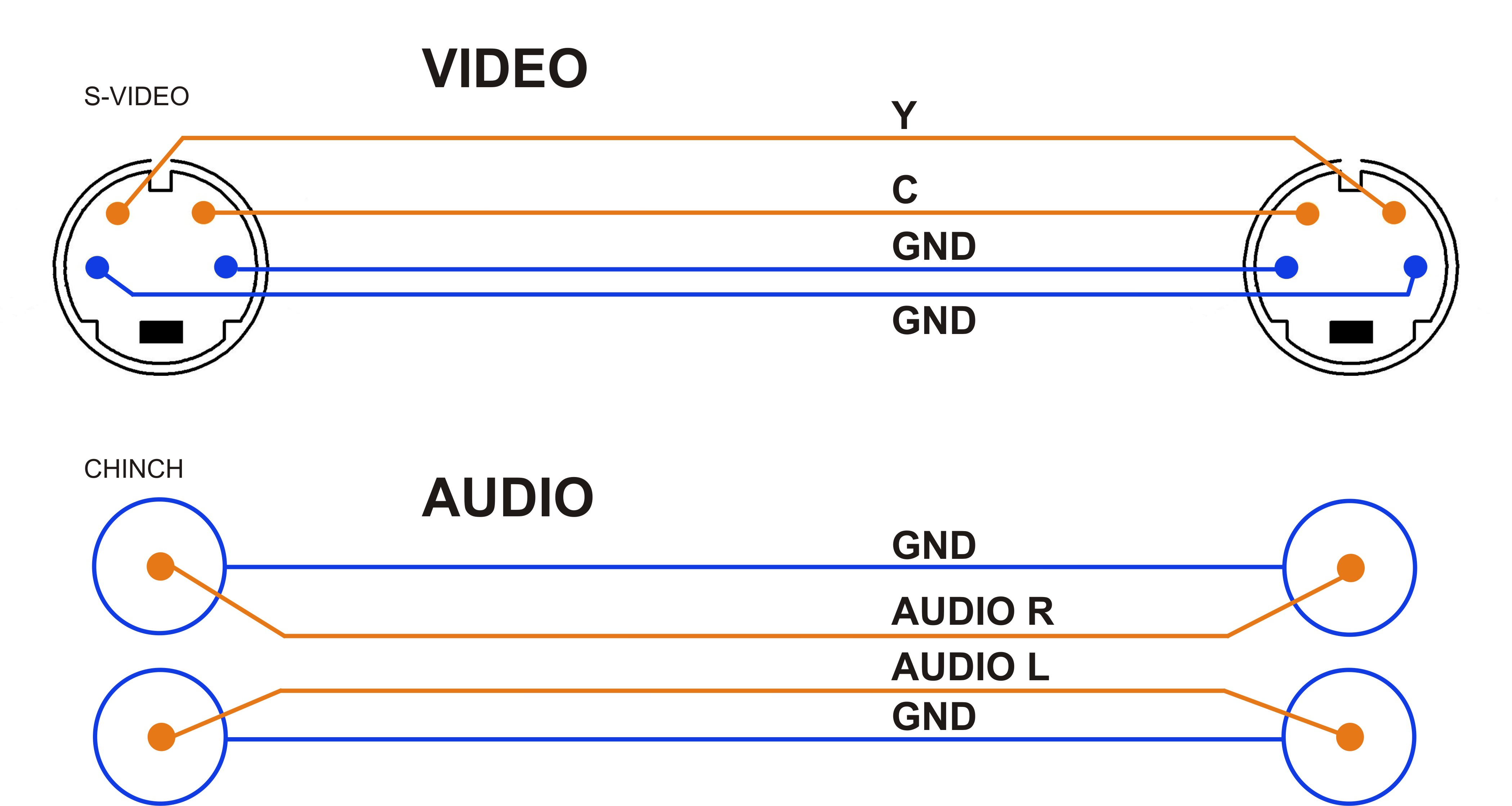 Połączenie s-vhs